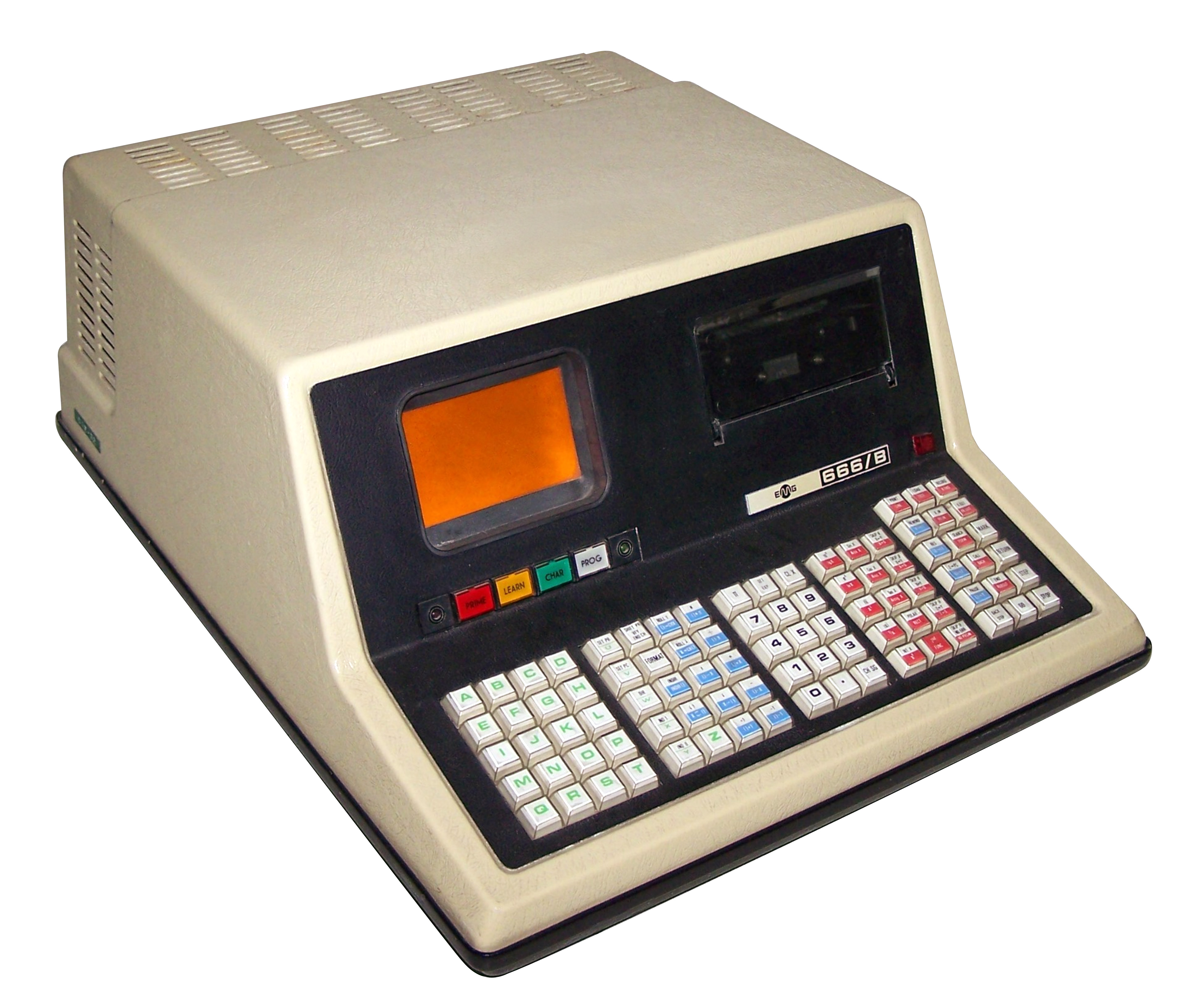 Az EMG 666/B programozható asztali számológép